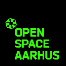 Open Space Aarhus' logo, som det anvendes på foreningens wiki-sider.